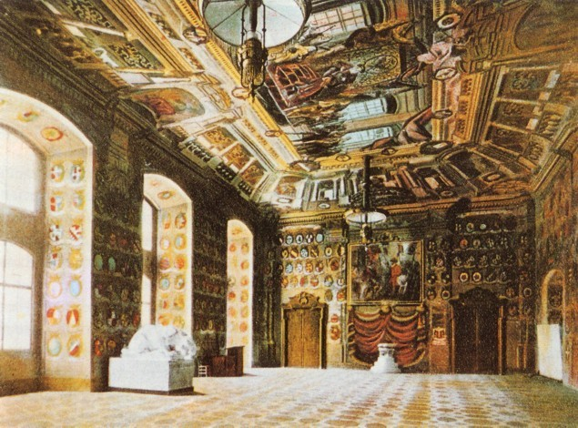 Der Große Wappensaal im Landhaus Klagenfurt mit dem Fürstenstein und einer Gipsplastik eines Tigers von Friedrich Gornik; Korrespondenzkarte, Verlag Louis Glaser, Leipzig 1904